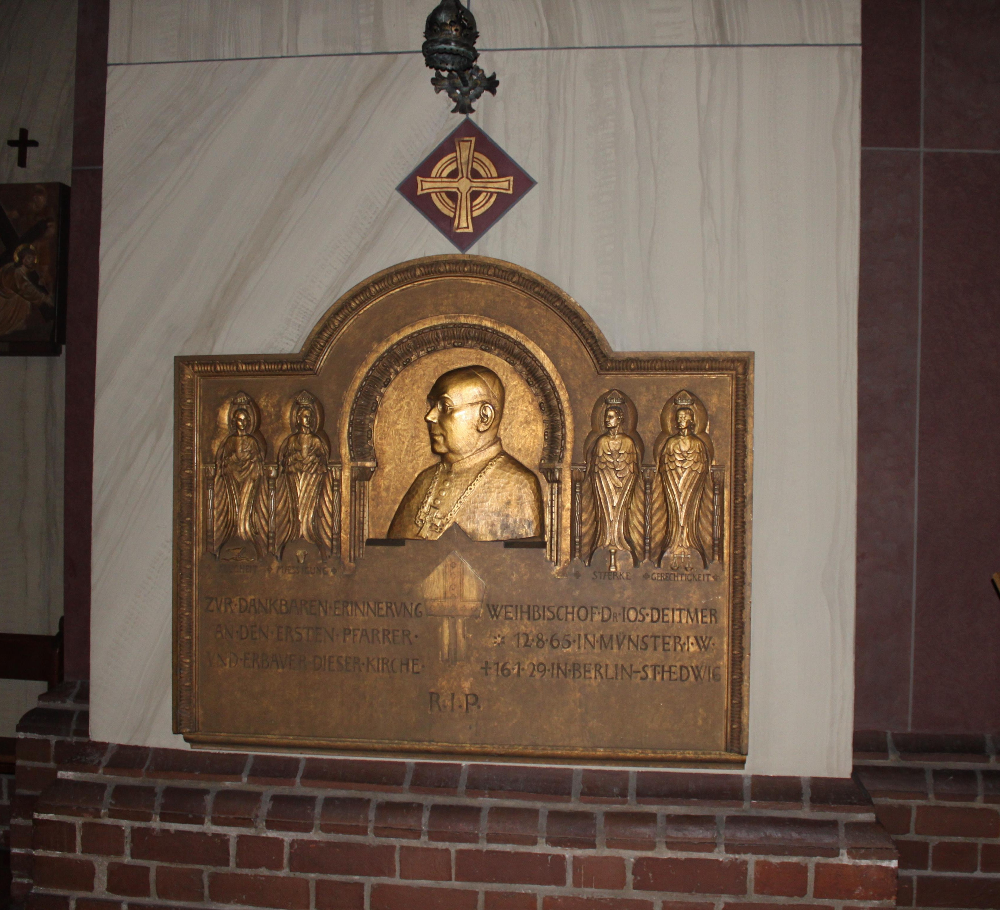 Berlin, Rosenkranz-Basilika, Gedenktafel für den ersten Pfarrer und späteren Weihbischof Josef Deitmer